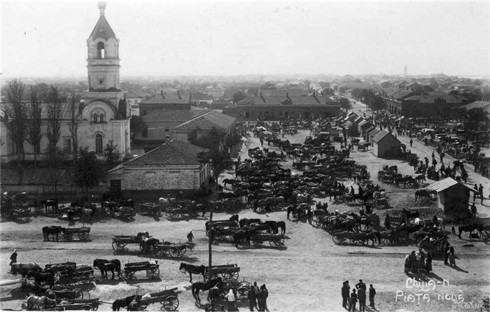 Торгова площа біля Свято-Покровського собору, м. Кілія. Фотографія 1930-х років (чорно-біла версія).